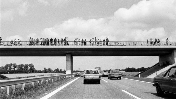 Gespannt warten Schaulustige auf die ersten Autos auf dem neuen A7-Abschnitt von Tarp nach Handewitt im Kreis Schleswig-Flensburg.